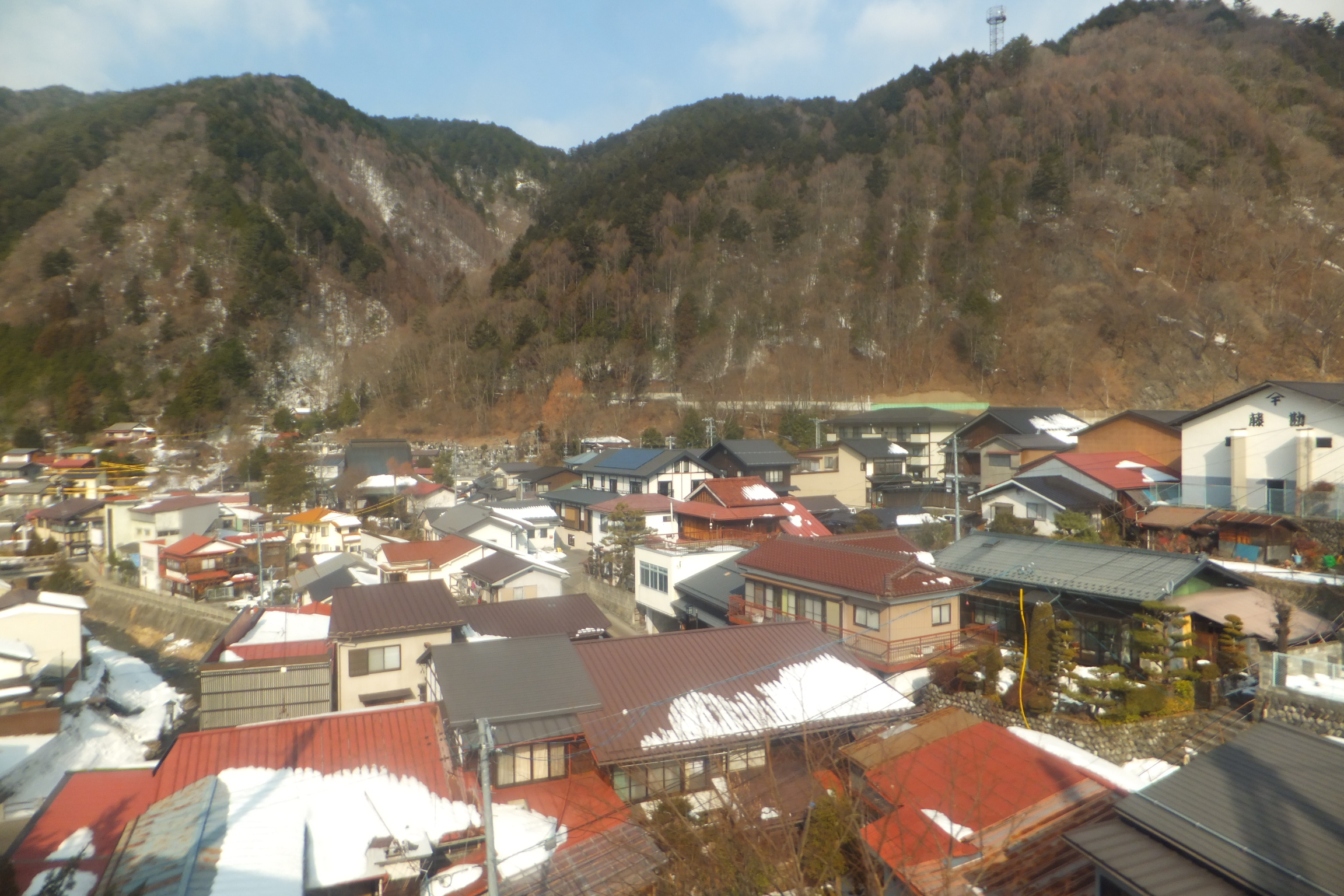 長野県木曽郡木曽町中心部